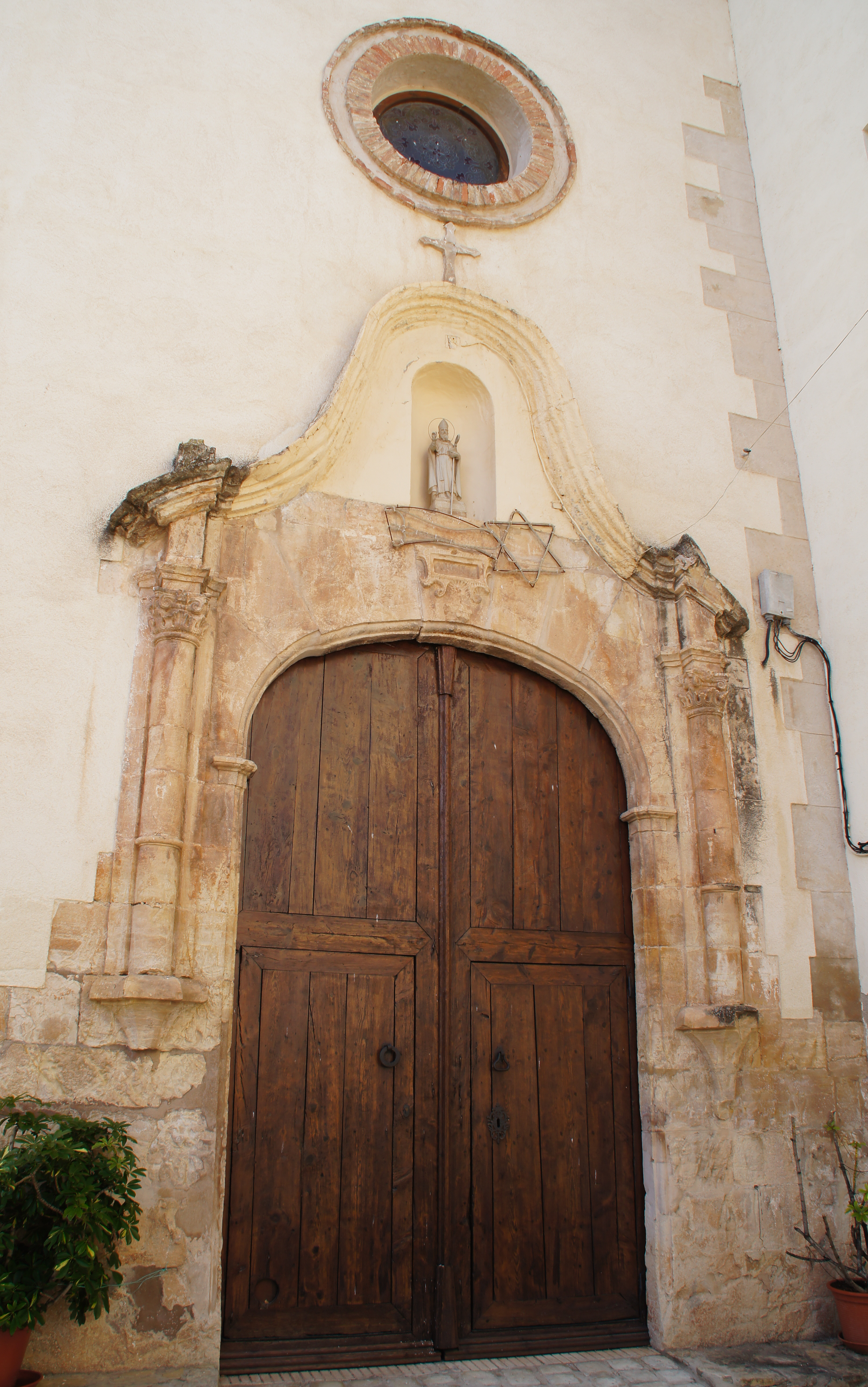 Església parroquial de Sant Agustí (Alfara de Carles)